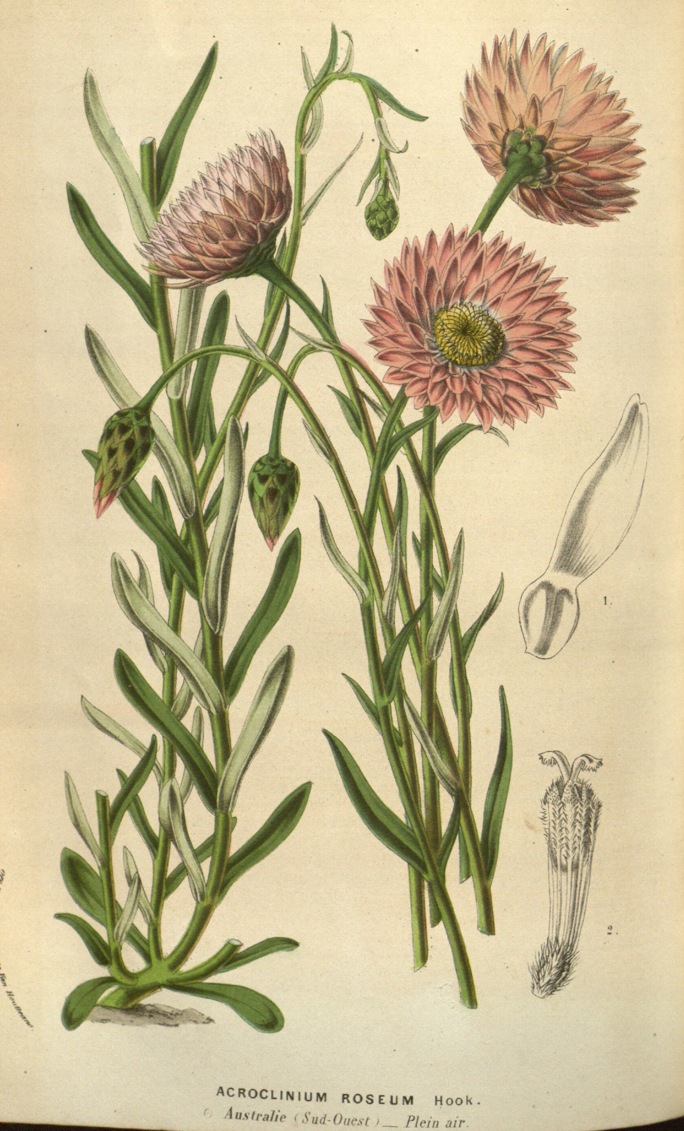 Legende: Unterer und oberer Teil der Pflanze. 1 Hüllblatt. 2 Röhrenblüte.